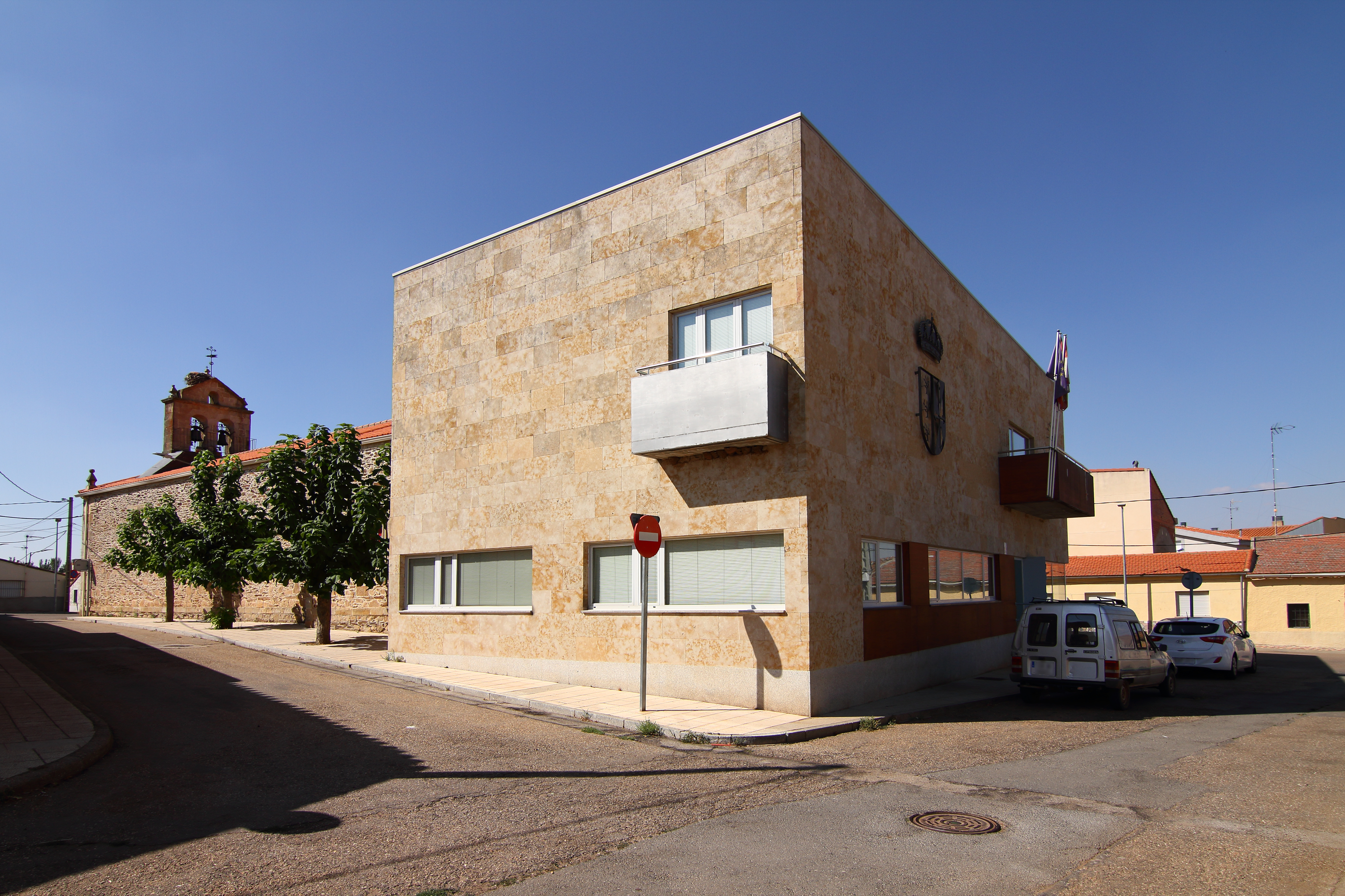 Ayuntamiento de Doñinos de Salamanca